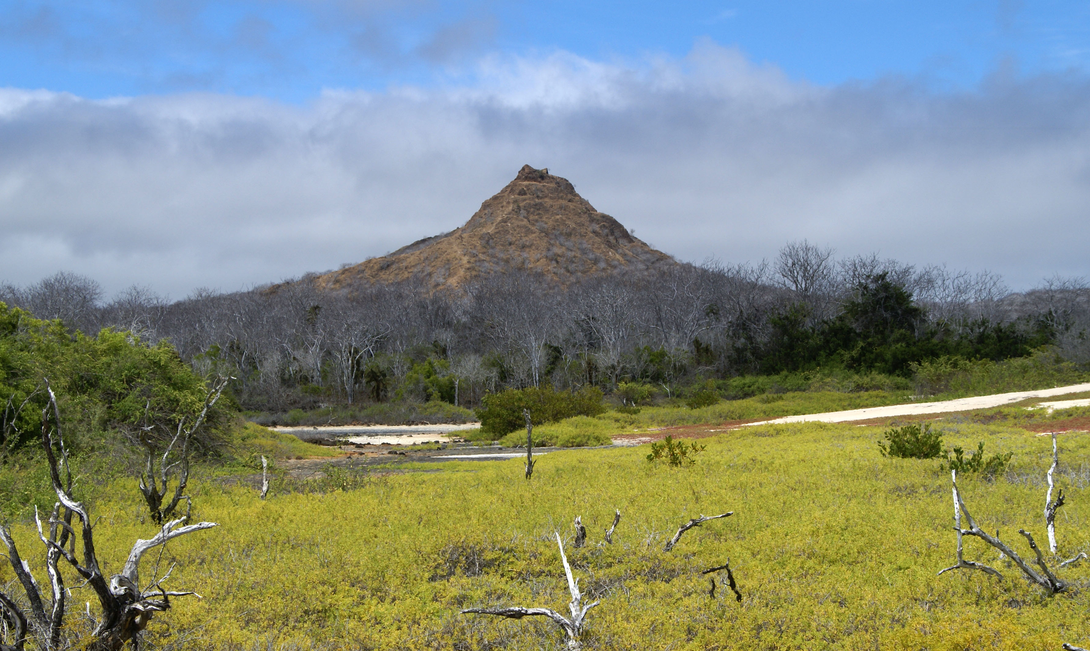 Santa Cruz, Cerro Dragon